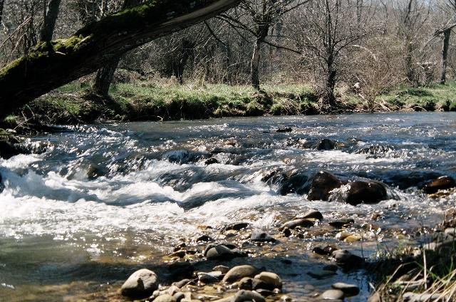 Aguas de montaña